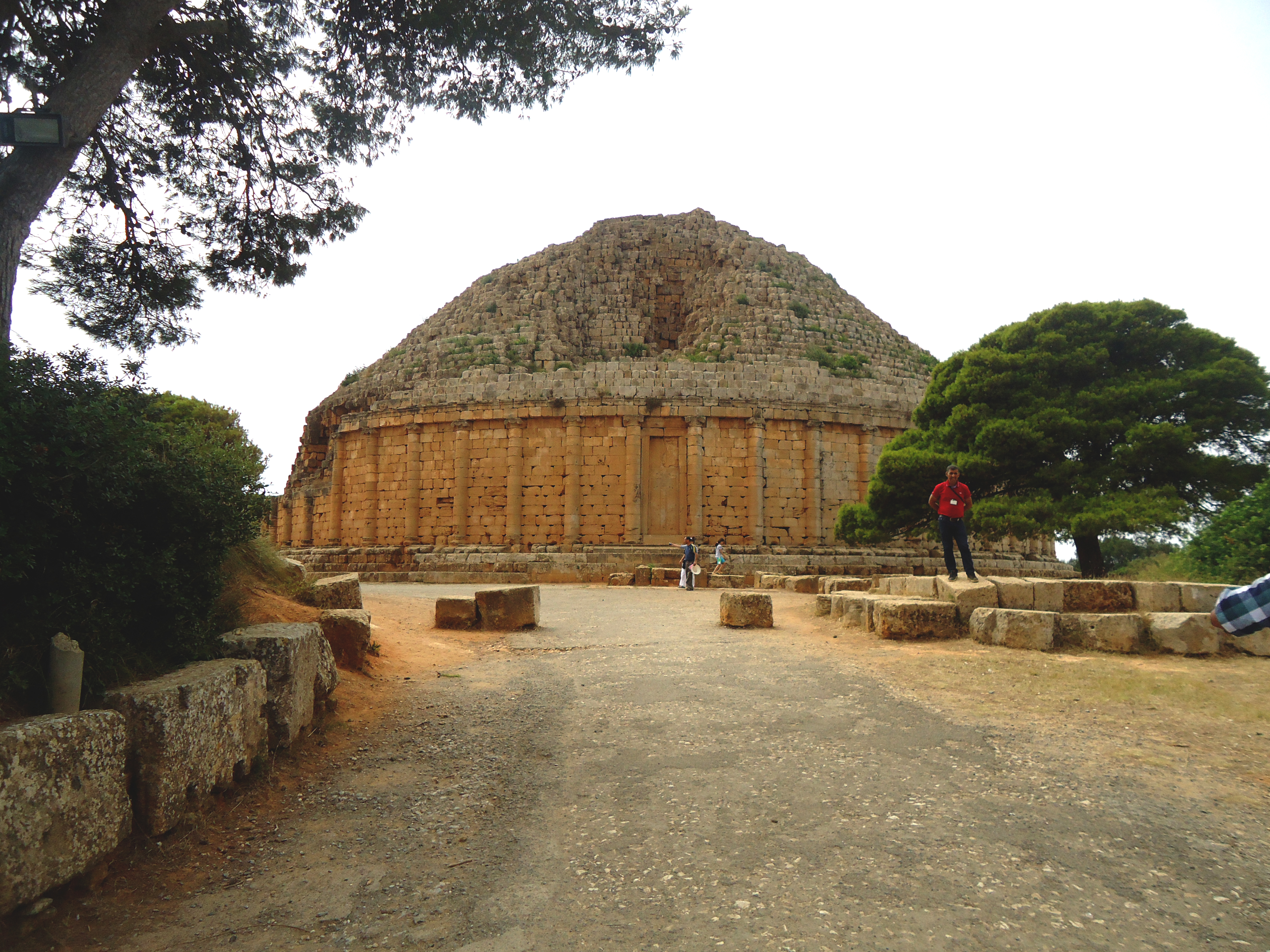 Le mausolée de Maurétanie, appelé le tombeau de la chrétienne (kbar romia) et un monument historique qui se trouve dans la wilaya de Tipaza et sert de tombeau pour le roi numide "Juba II" et sa femme "Cléopâtre Séléné".